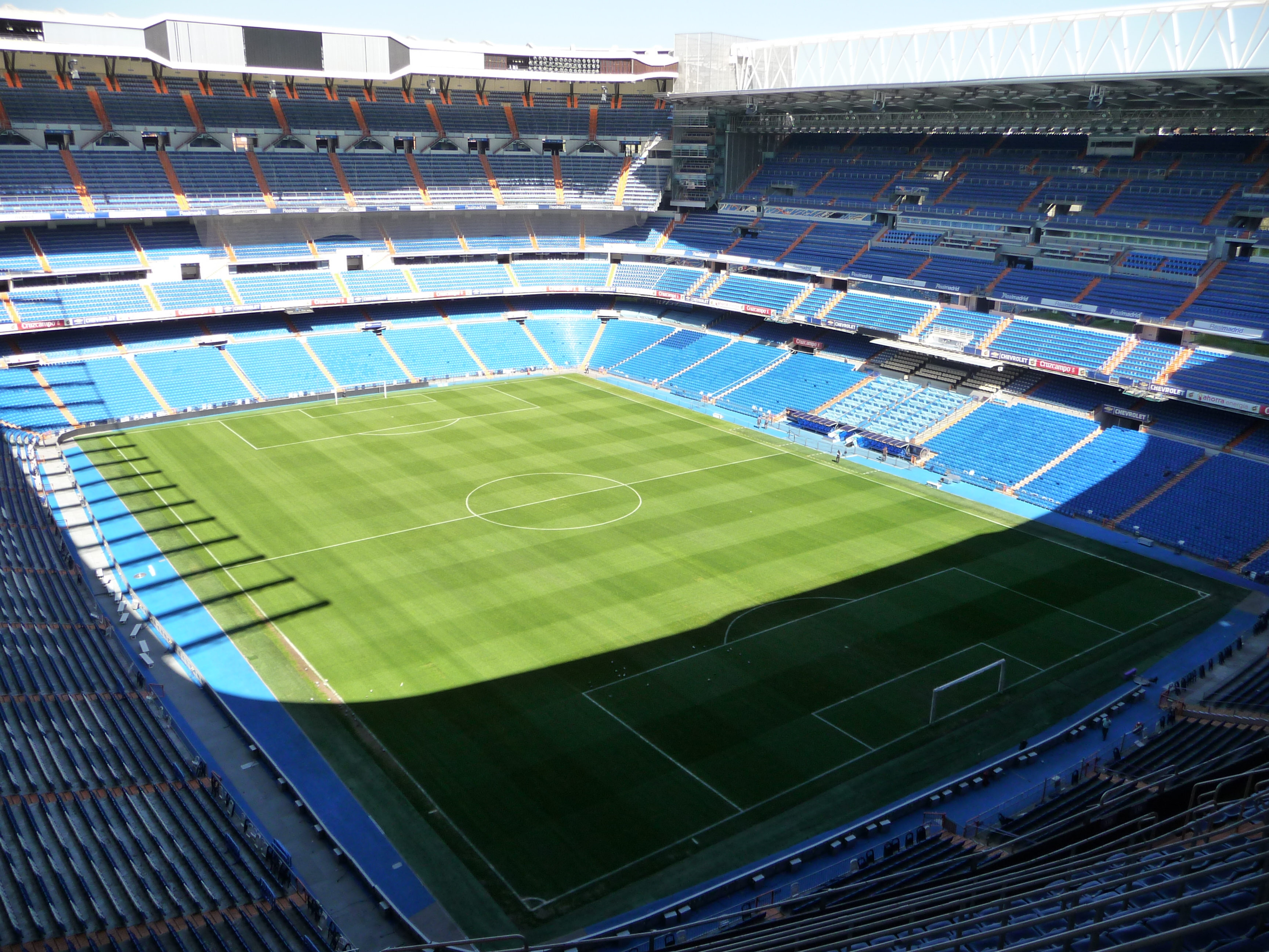 Stade Bernabéu